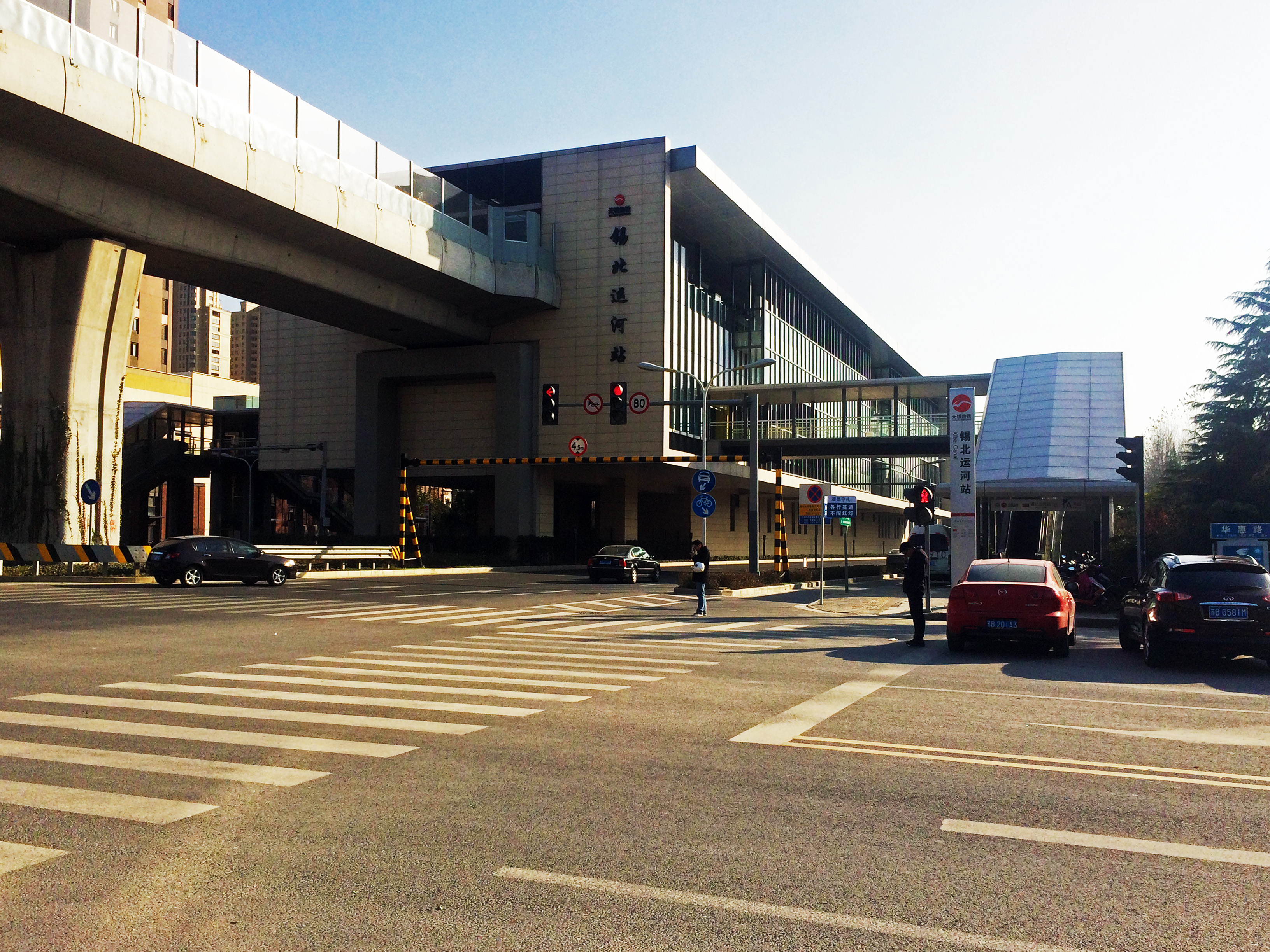 無錫地鐵1號線錫北運河站外景